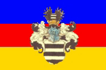 Flagge vom Fantasiestaat Fürstentum Germania